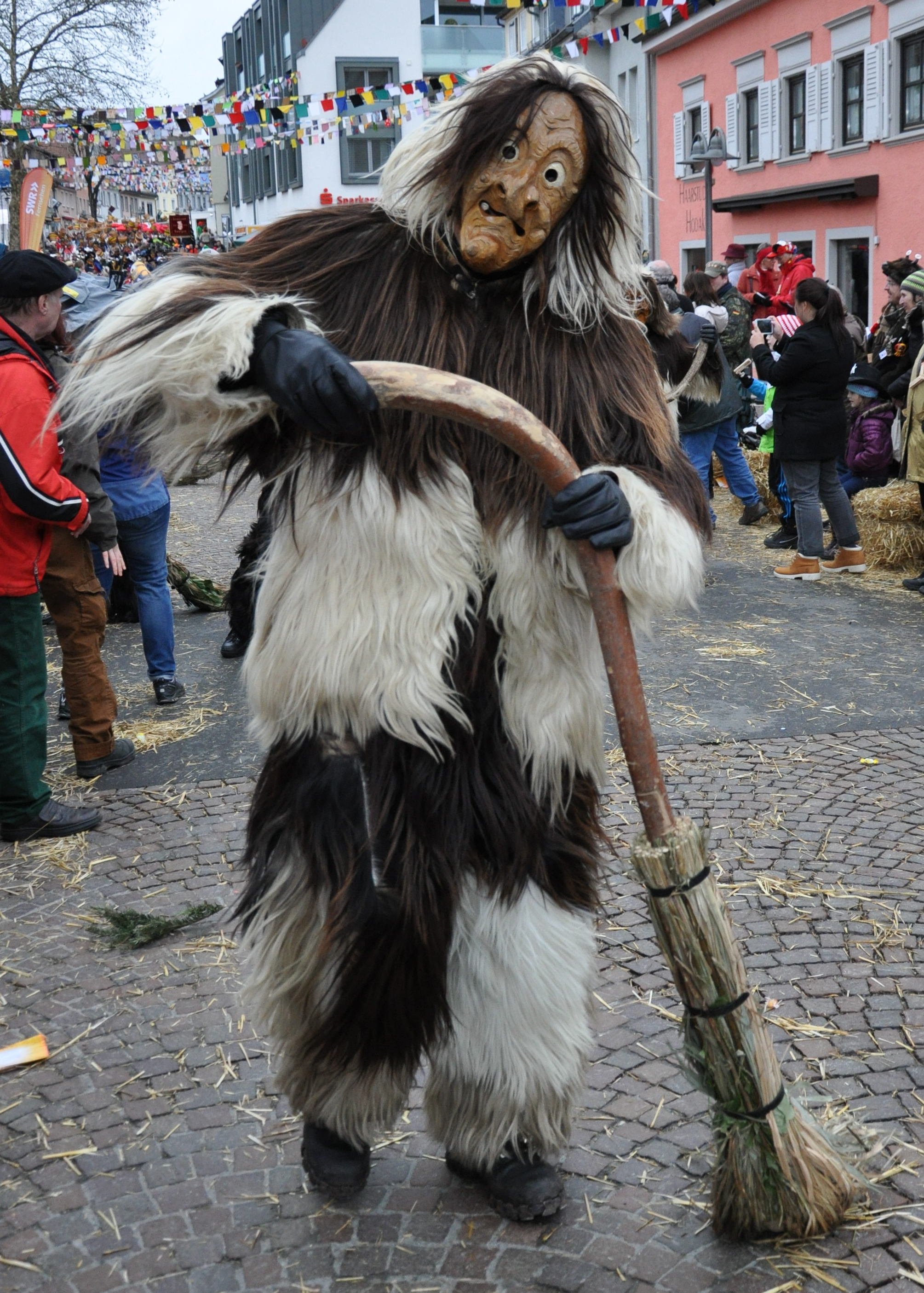 Karnöffelzunft Willisau; Narrenfigur: Moorsträggerle Fotografiert beim Landschaftstreffen der Vereinigung Schwäbisch-Alemannischer Narrenzünfte (VSAN) 2014 in Tettnang; Narrensprung am Sonntag, 16. Februar 2014